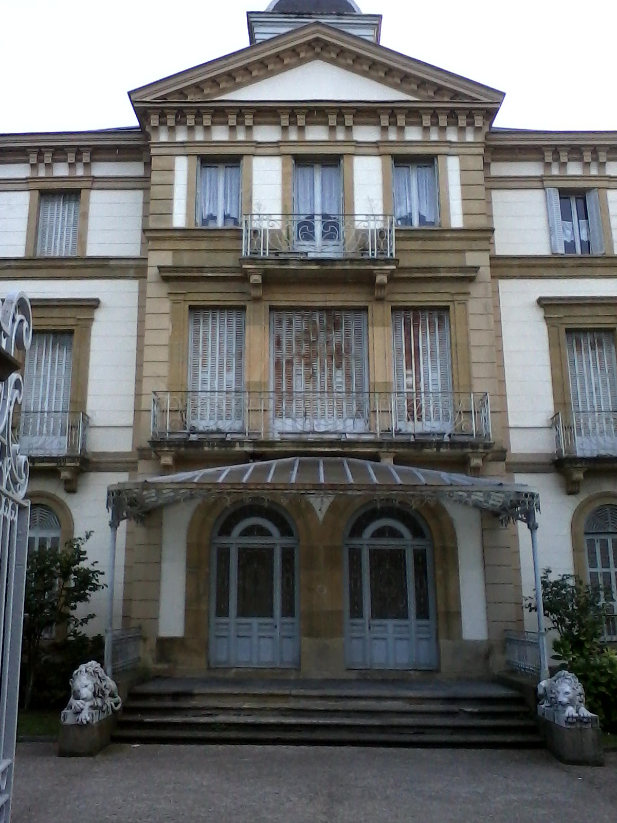 Fachada principal de Villa Mundi